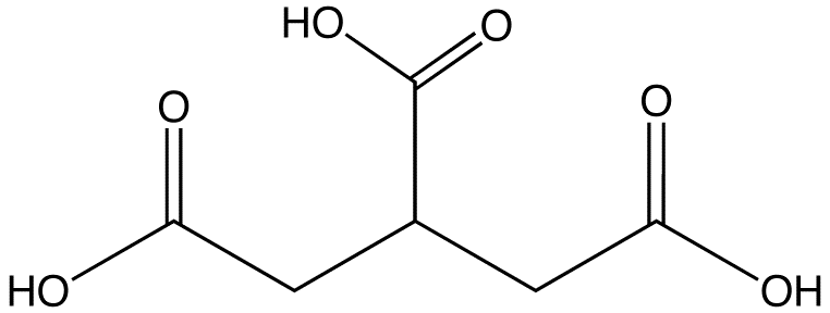 structure for tricarballylic acid